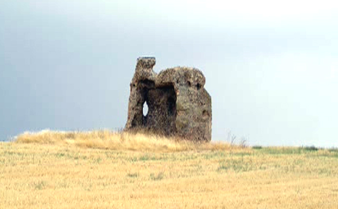 torreon de pozal de gallinas por jose maria rodriguez martin "Chefo"